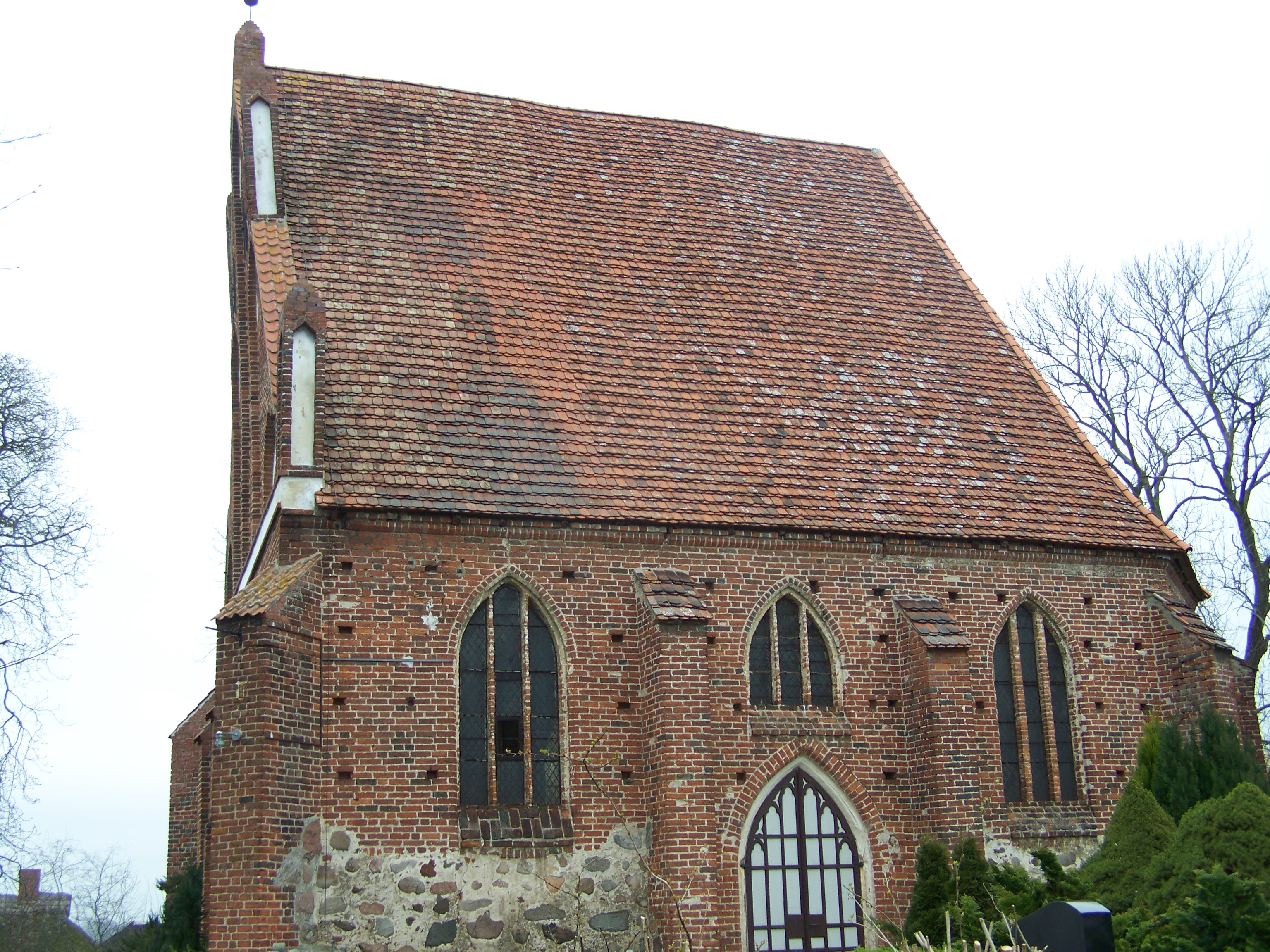 Dorfkirche_Velgast,_Seitenansicht